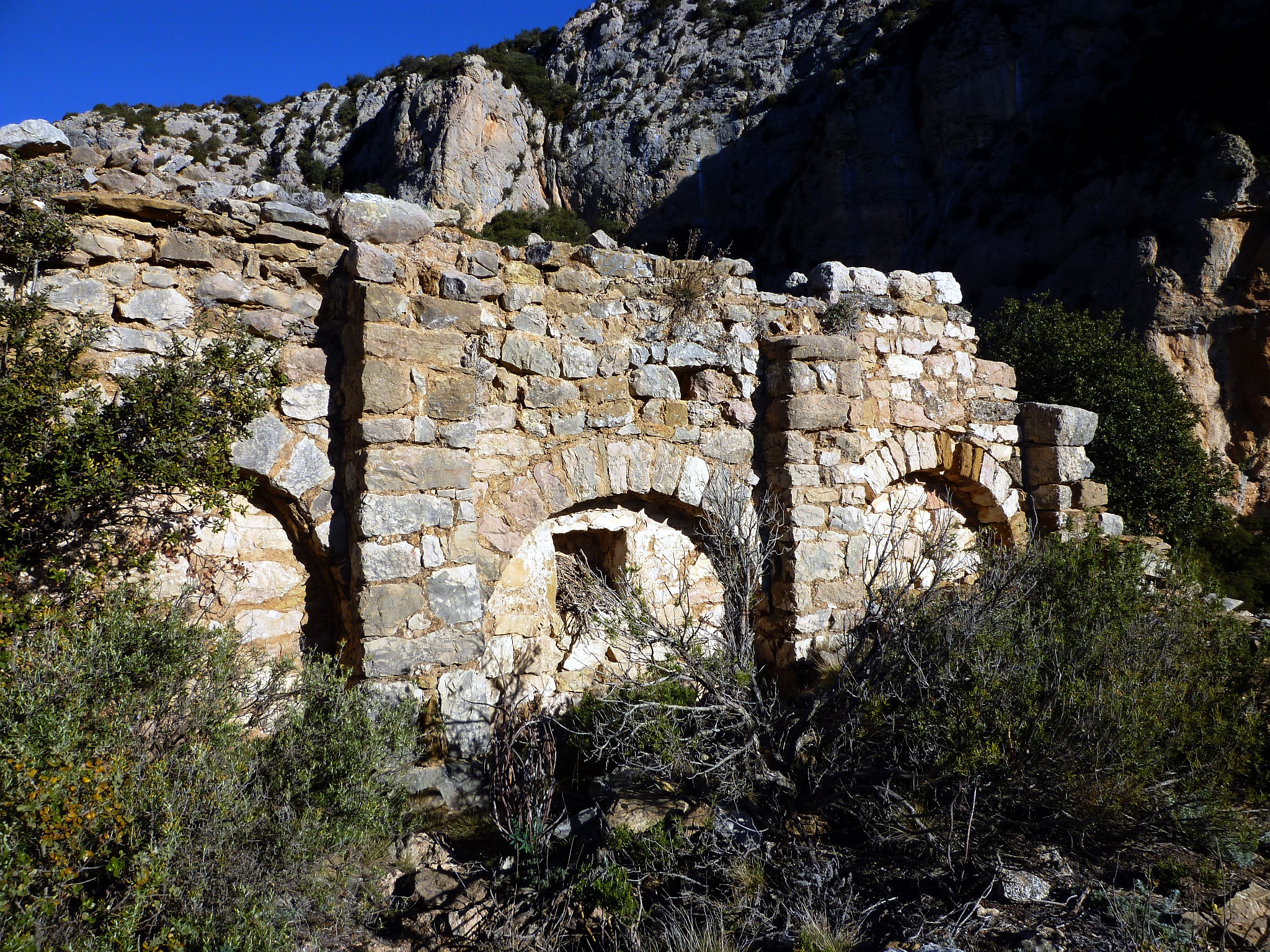 Sant Sadurní de la Fabregada (Vilanova de Meià): arcs formers